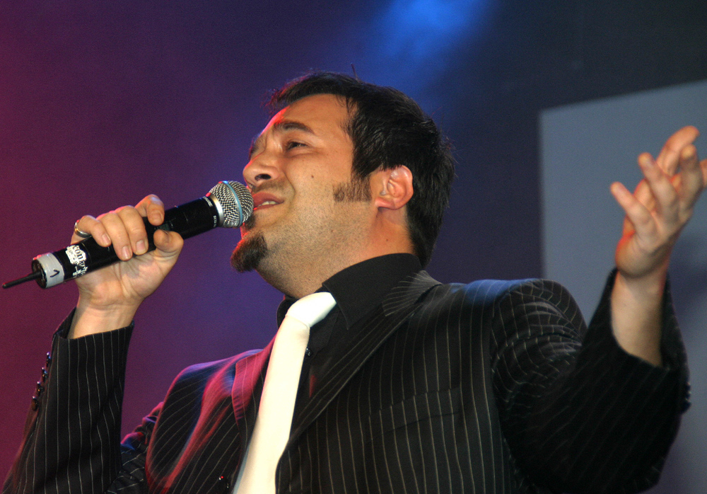 Laith al Deen beim Benefiz-Konzert Cover me in Köln